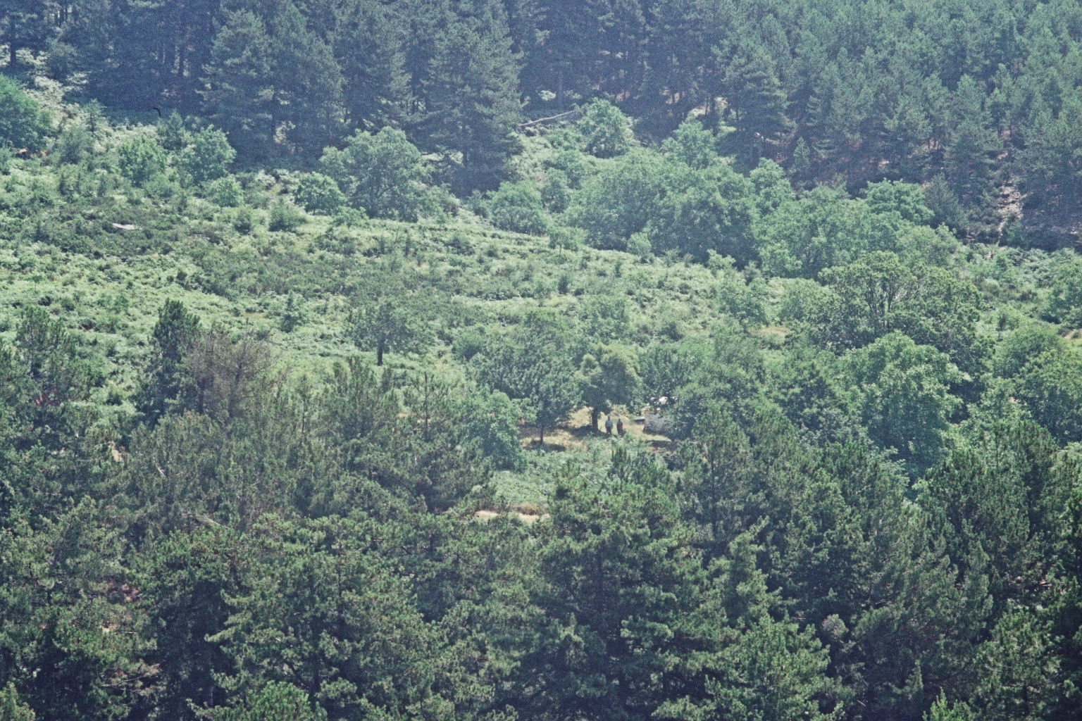 Obstplantage im Franko, im Zentrum des Bildes die Eigentümer Mitsos und Aphrodite Kordelis aus Limenaria